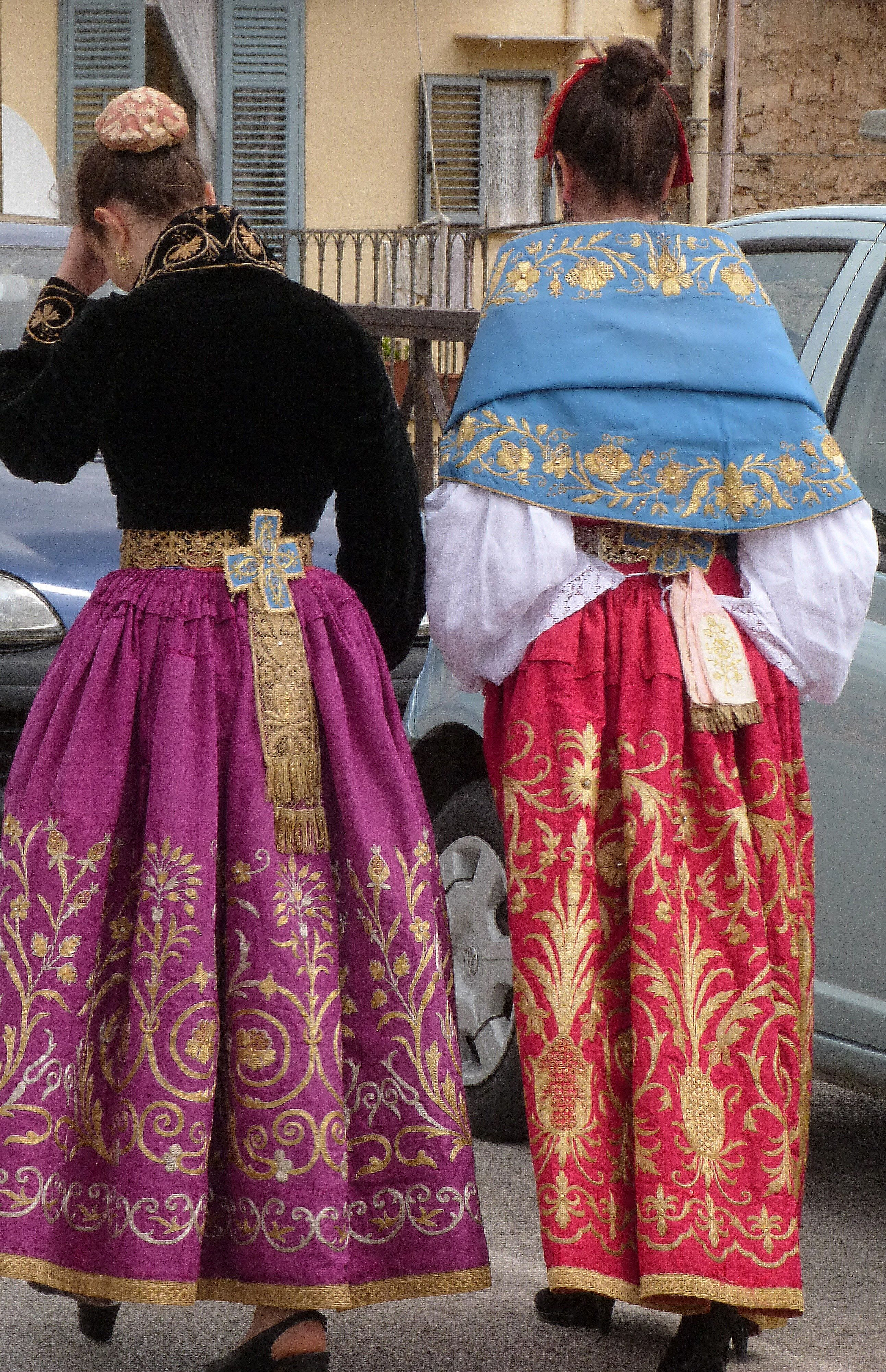 Piana degli Albanesi: Trachten